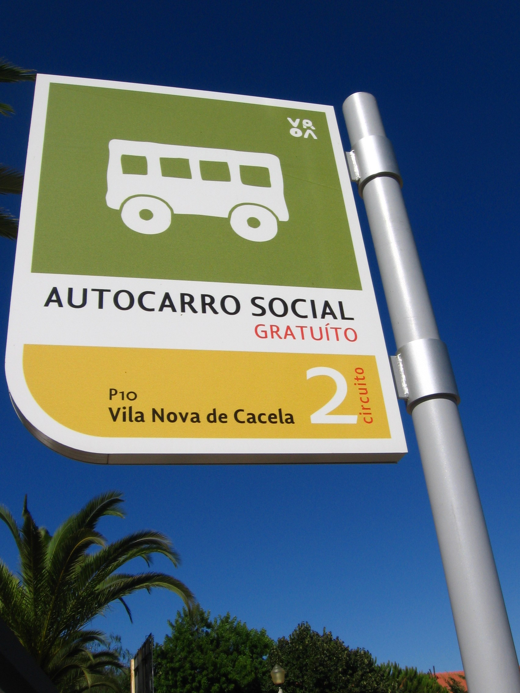 Paragem do autocarro social que serve o concelho de Vila Real de Santo António em Portugal